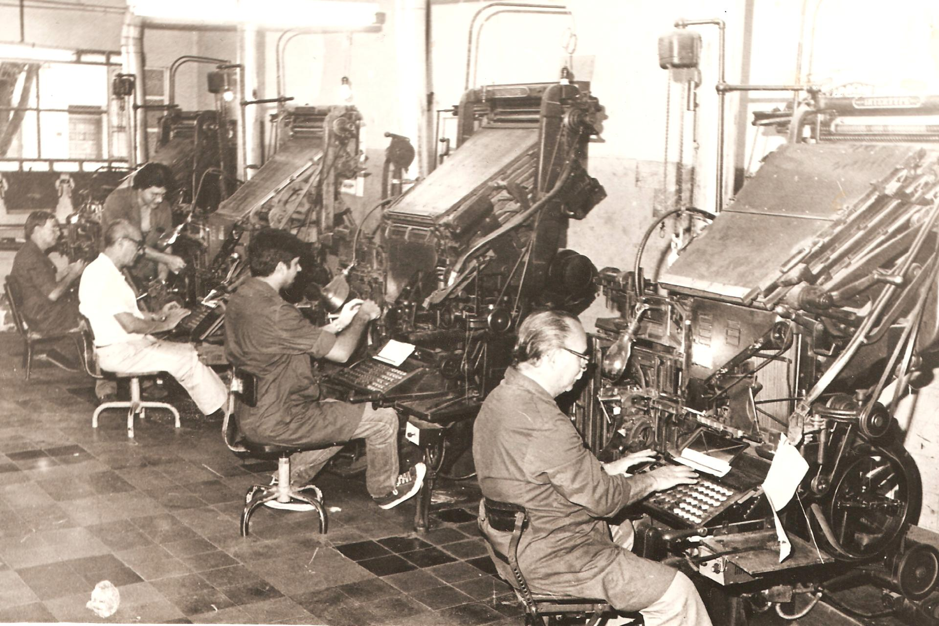 Linotipos con las que se componían las líneas de plomo para su impresión en el periódico.